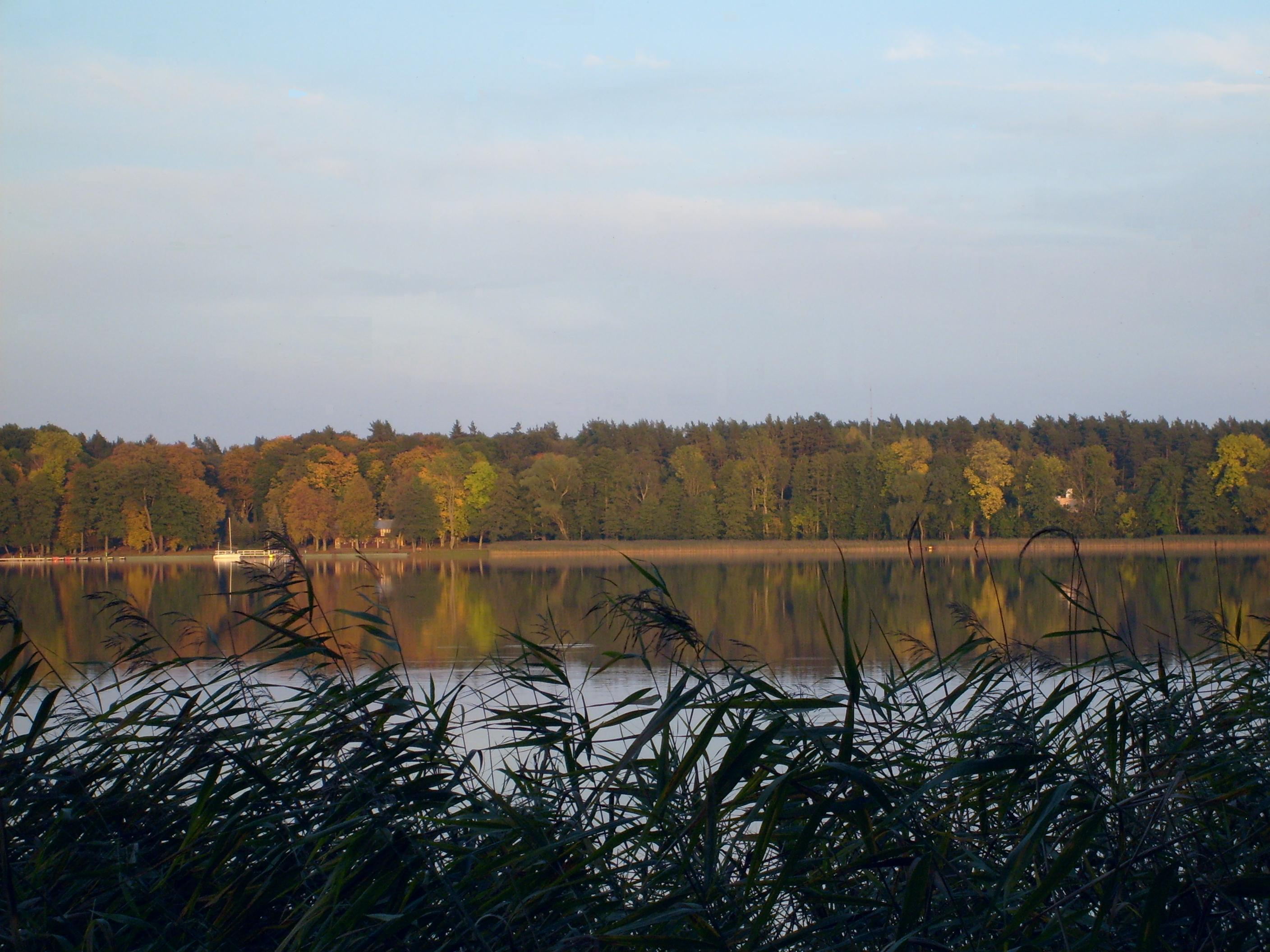 Omulew - jezioro